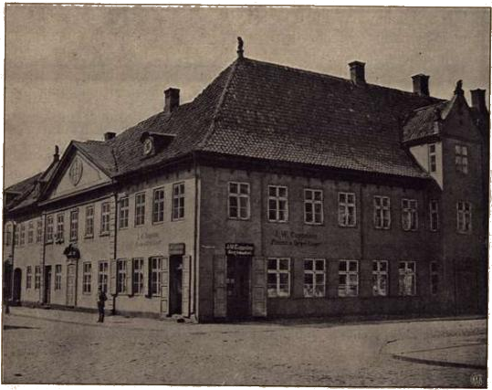 Collettgården i Christiania.